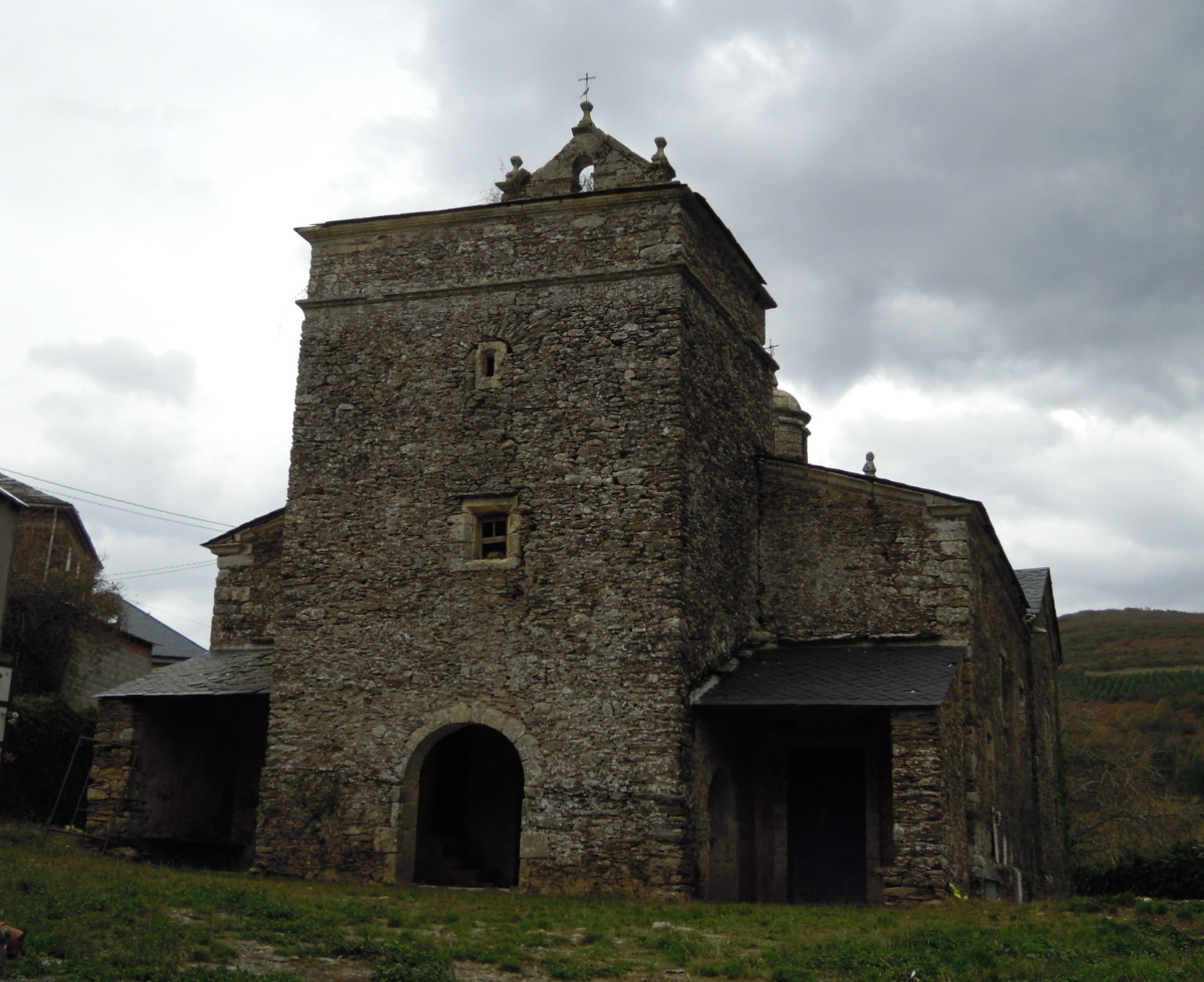 Igrexa parroquial de Nullán (As Nogais).